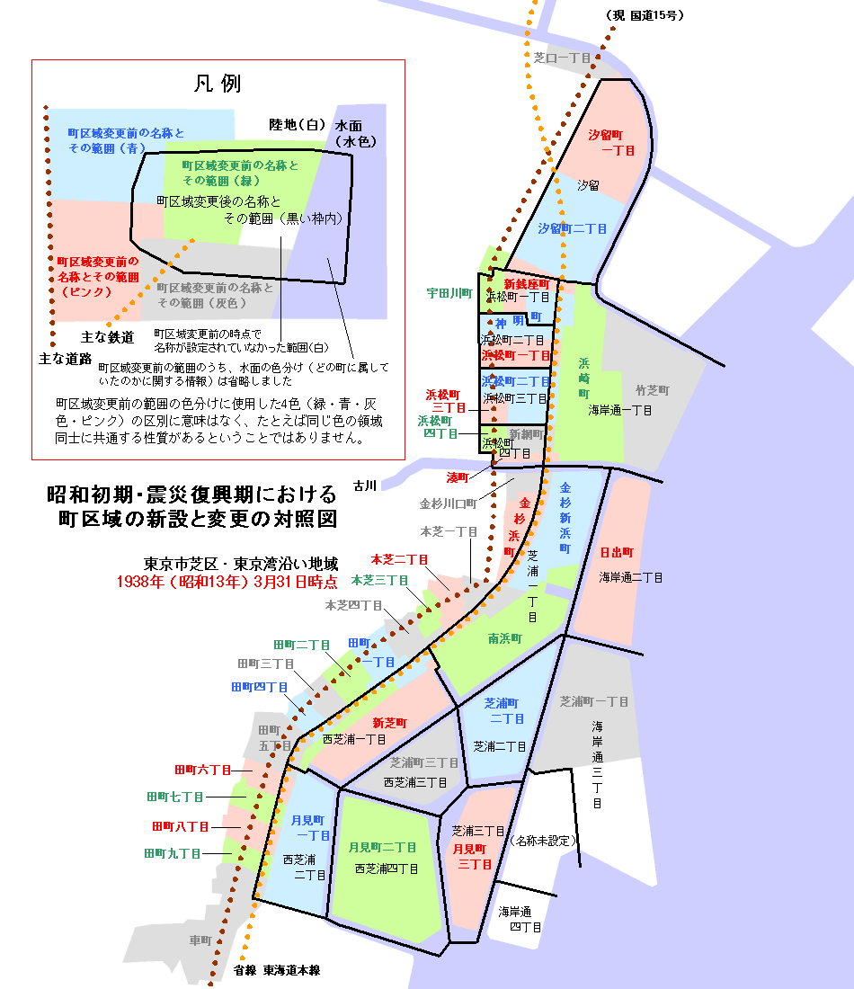 町区域の新設と変更の対照図 東京市芝区・東京湾沿い地域